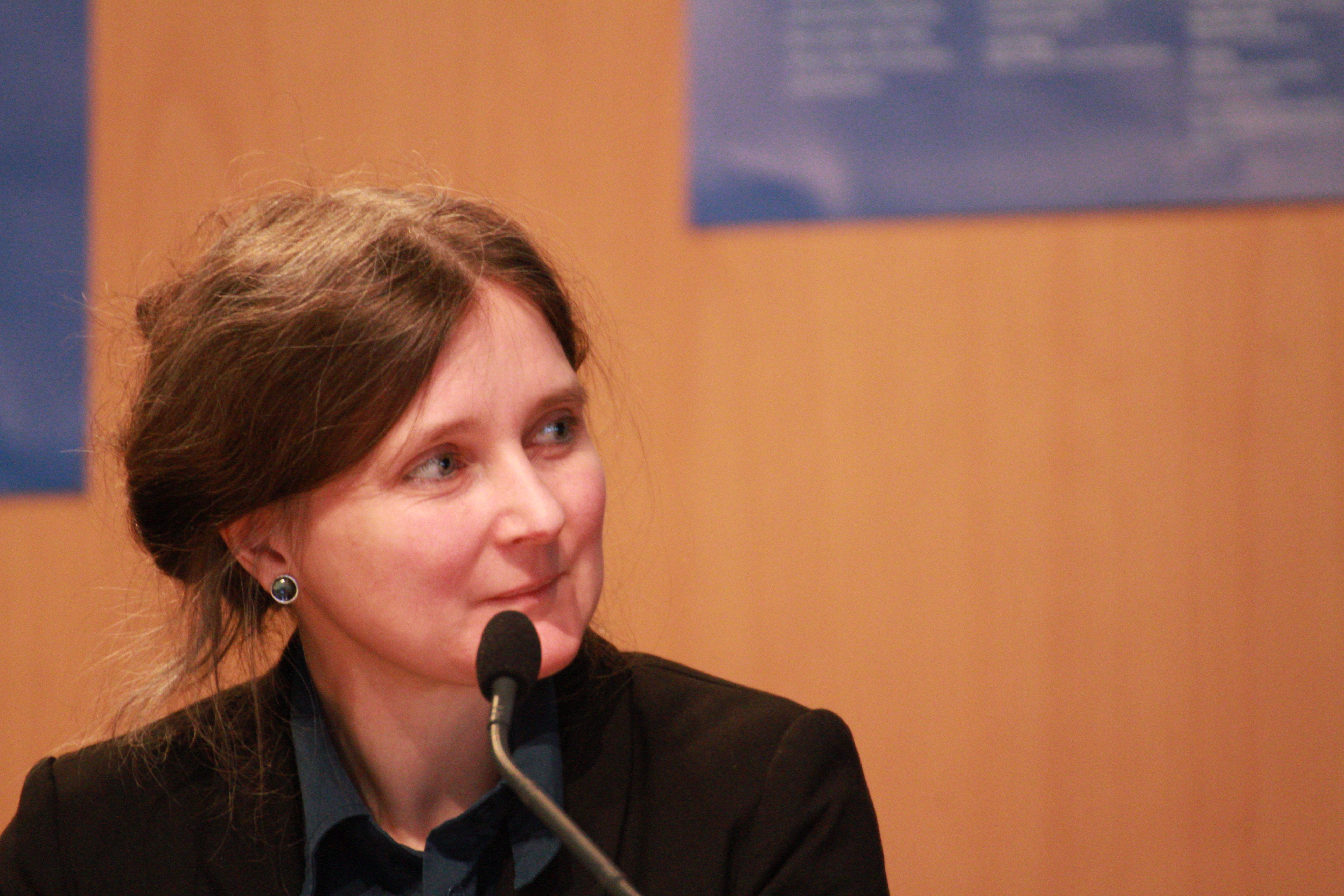 Marion Poschmann als Jurymitglied beim Literarischen März 2015